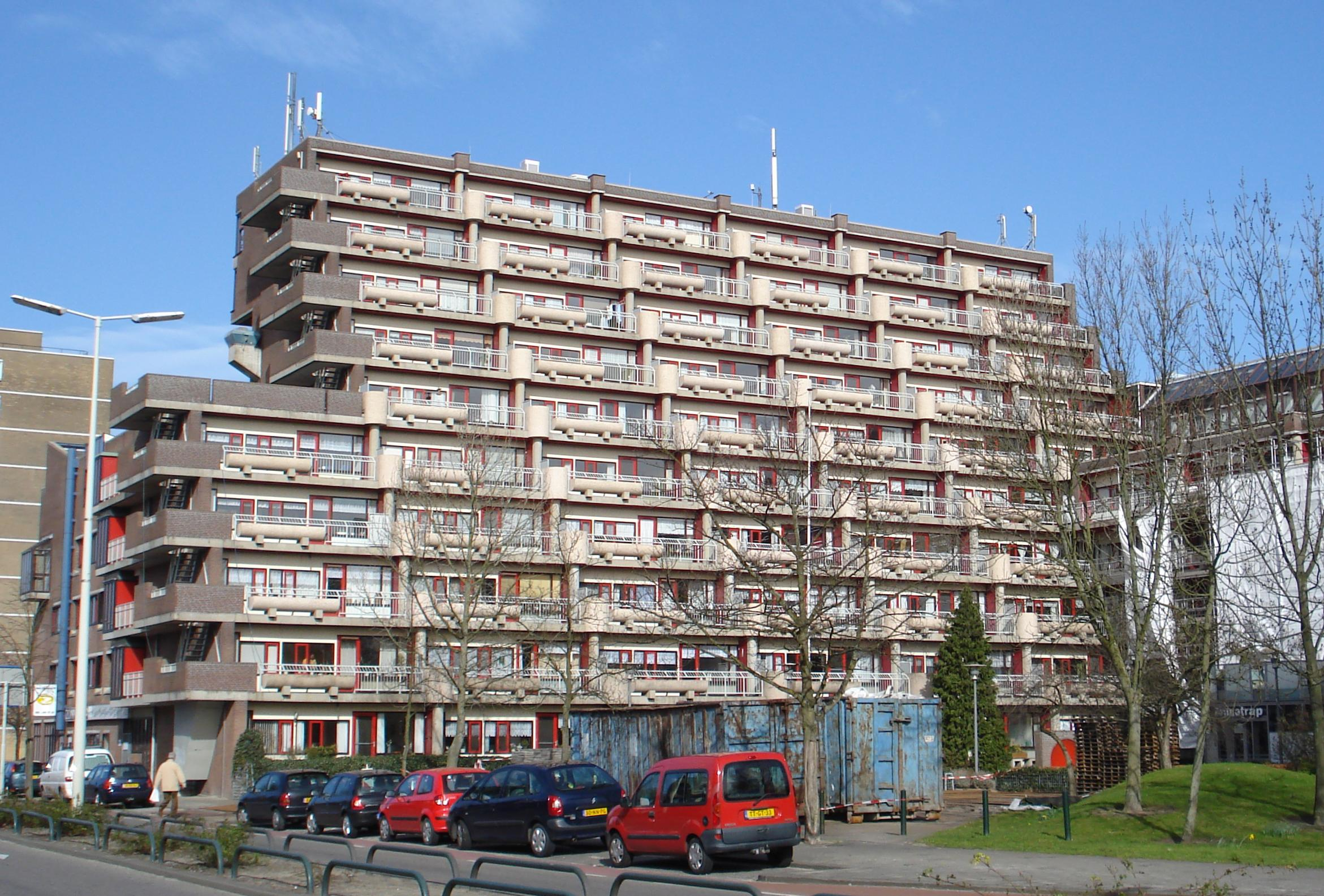 Rotterdam, Molenvliet. Flatgebouw "De Zonnetrap".